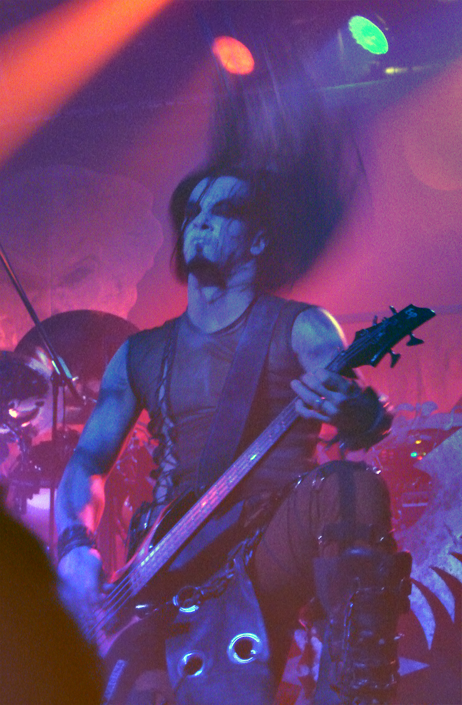 Behemoth en concert à La Locomotive, à Paris, le 17/02/2008: Orion à la basse.